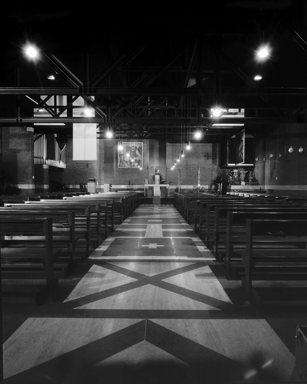 Interno dell'aula sacra